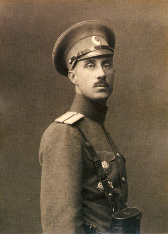 Ротмистр барон П. Н. Врангель